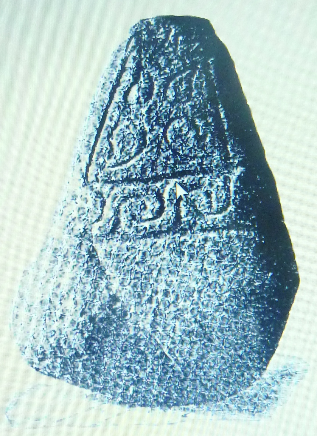 La stèle de Kermaria (découverte en 1898 par Paul du Châtellier), musée des antiquités nationales de Saint-Germain-en-laye)